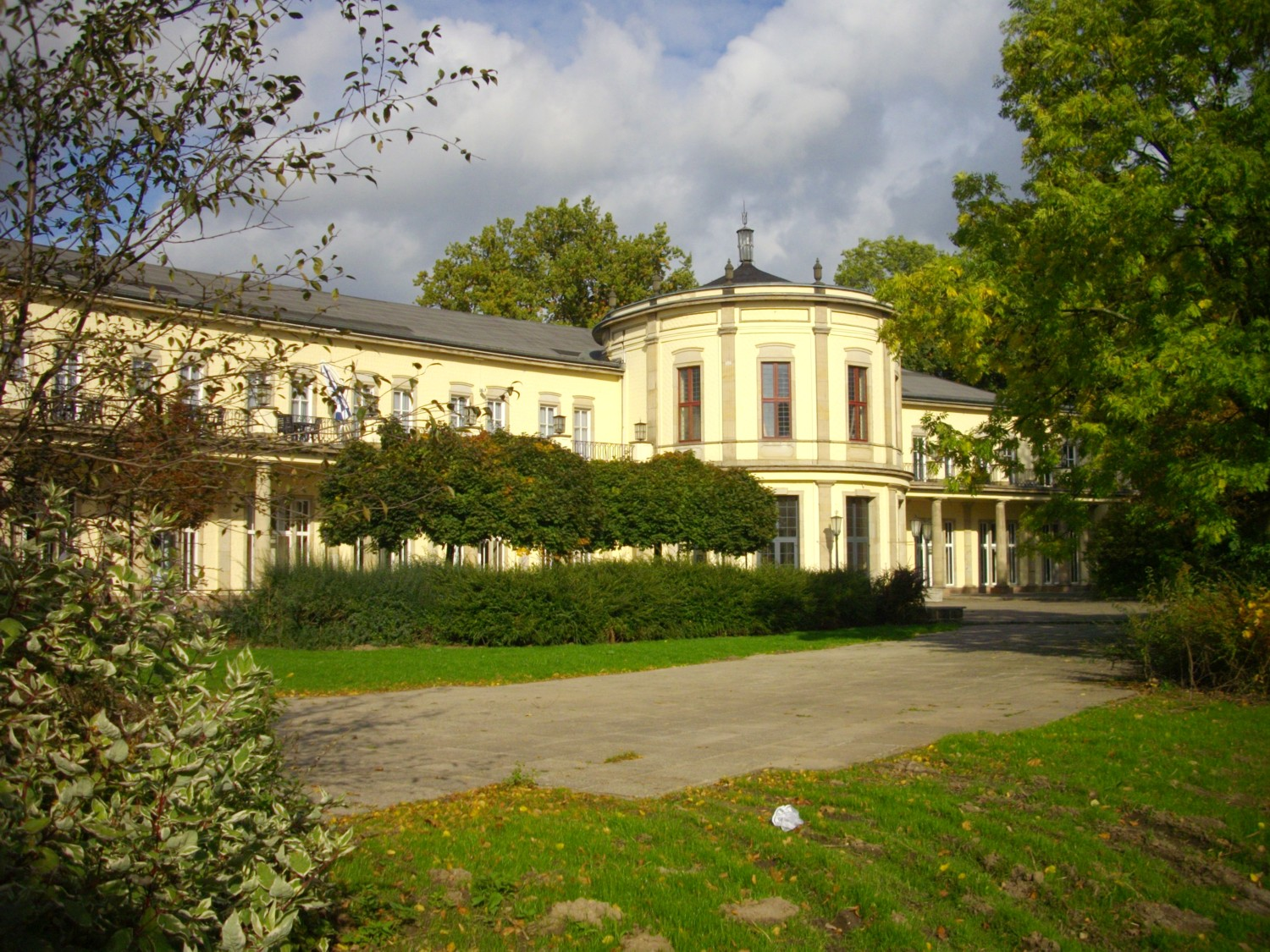 Parkgaststätte im Agra-Park bei Dölitz, zwischen Leipzig und Markkleeberg